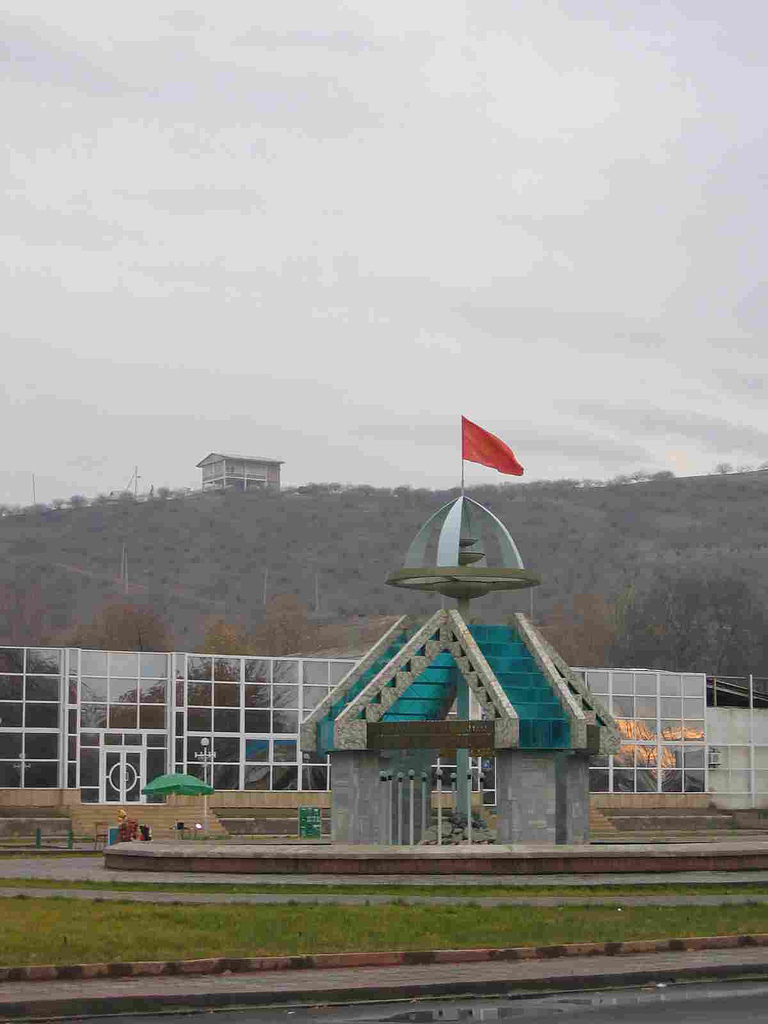 Jalalabad 7